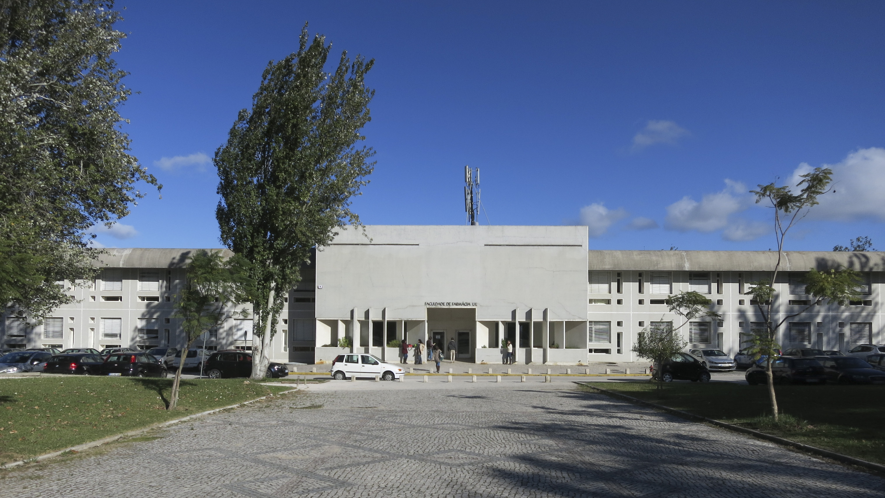 Raul Hestnes Fereira, Faculdade de Farmácia, Universidade de Lisboa